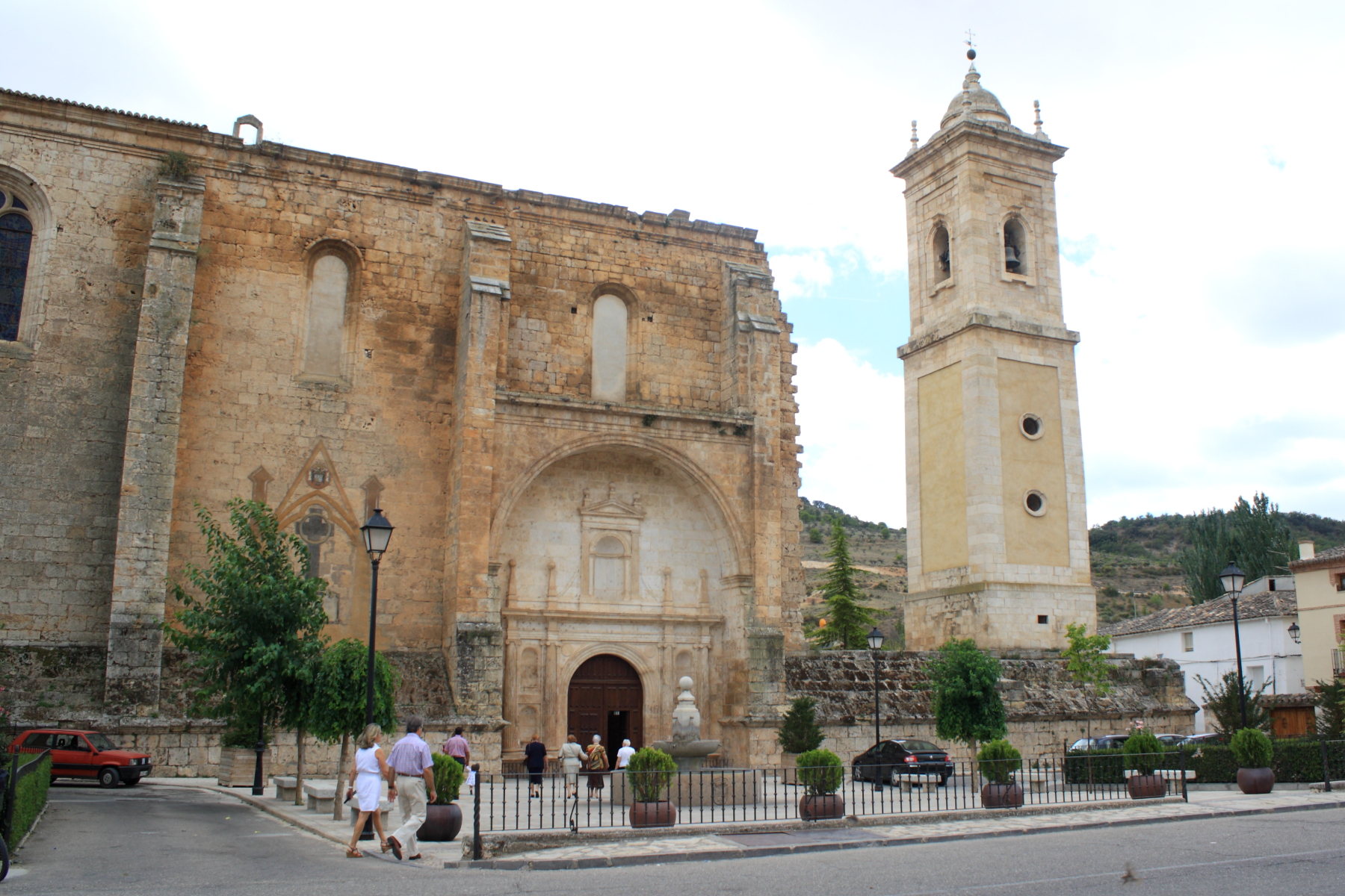 Iglesia de la Asunción, siglo XVI. Inacabada. Tendilla, provincia de Guadalajara, España.